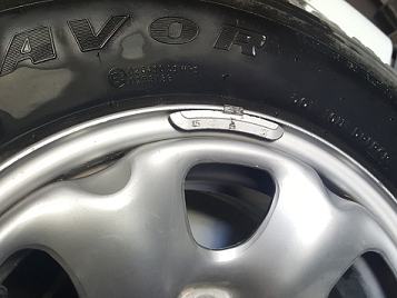 Detalle del plomo de una llanta.